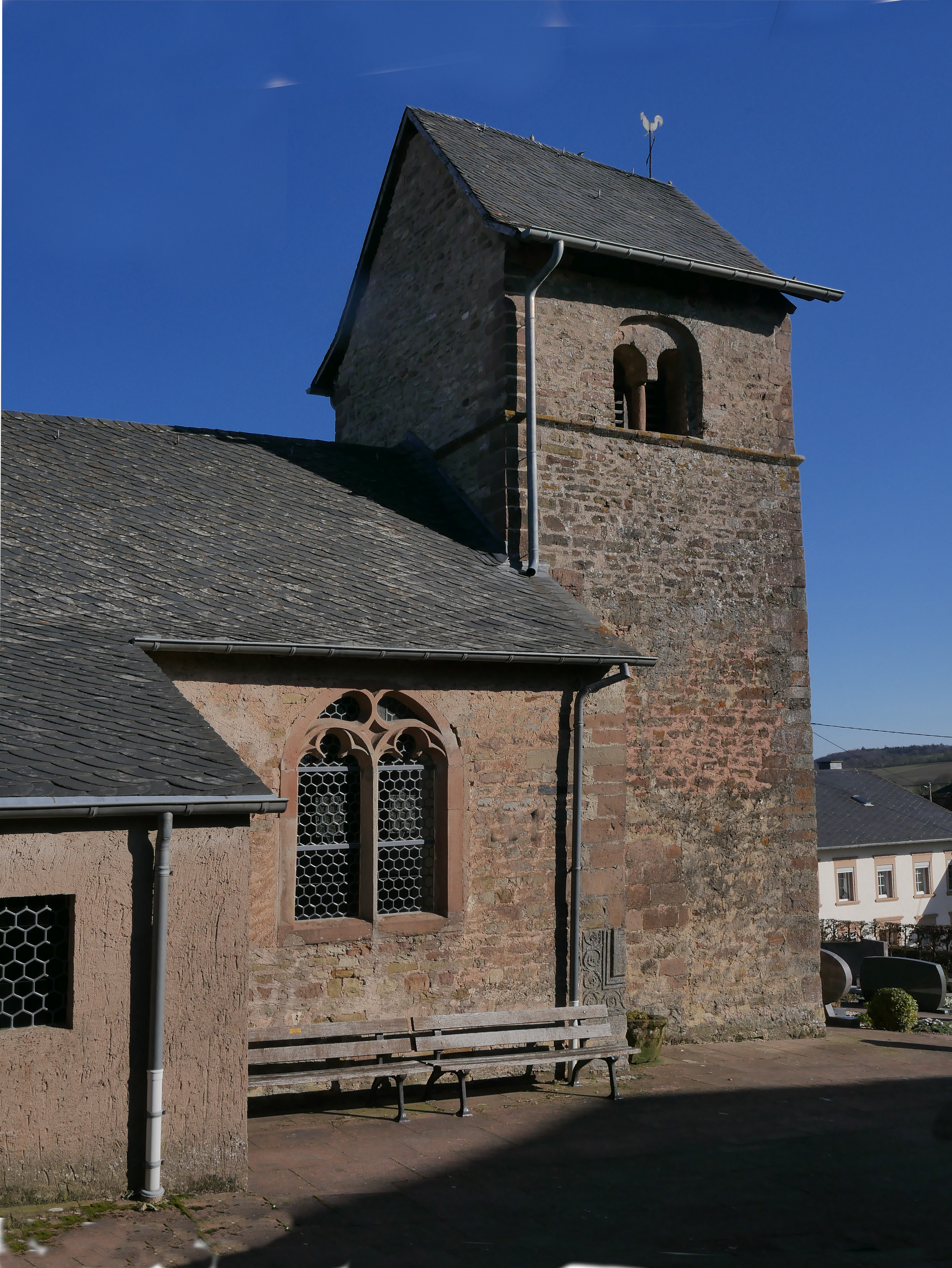 Kirche St. Abriuculus in Besslich (Rheinland-Pfalz, Kreis Trier-Saarburg), Aussenansicht